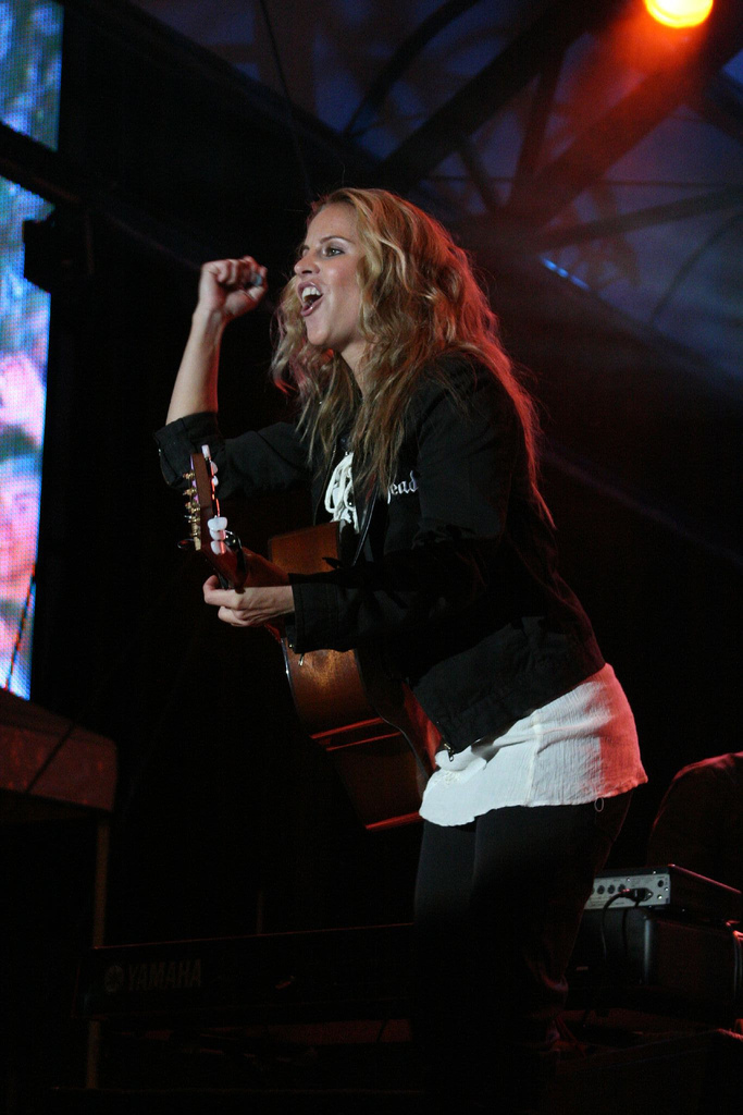 Lisa Miskovsky performing live during SR Festival at Kungsträdgården in Stockholm